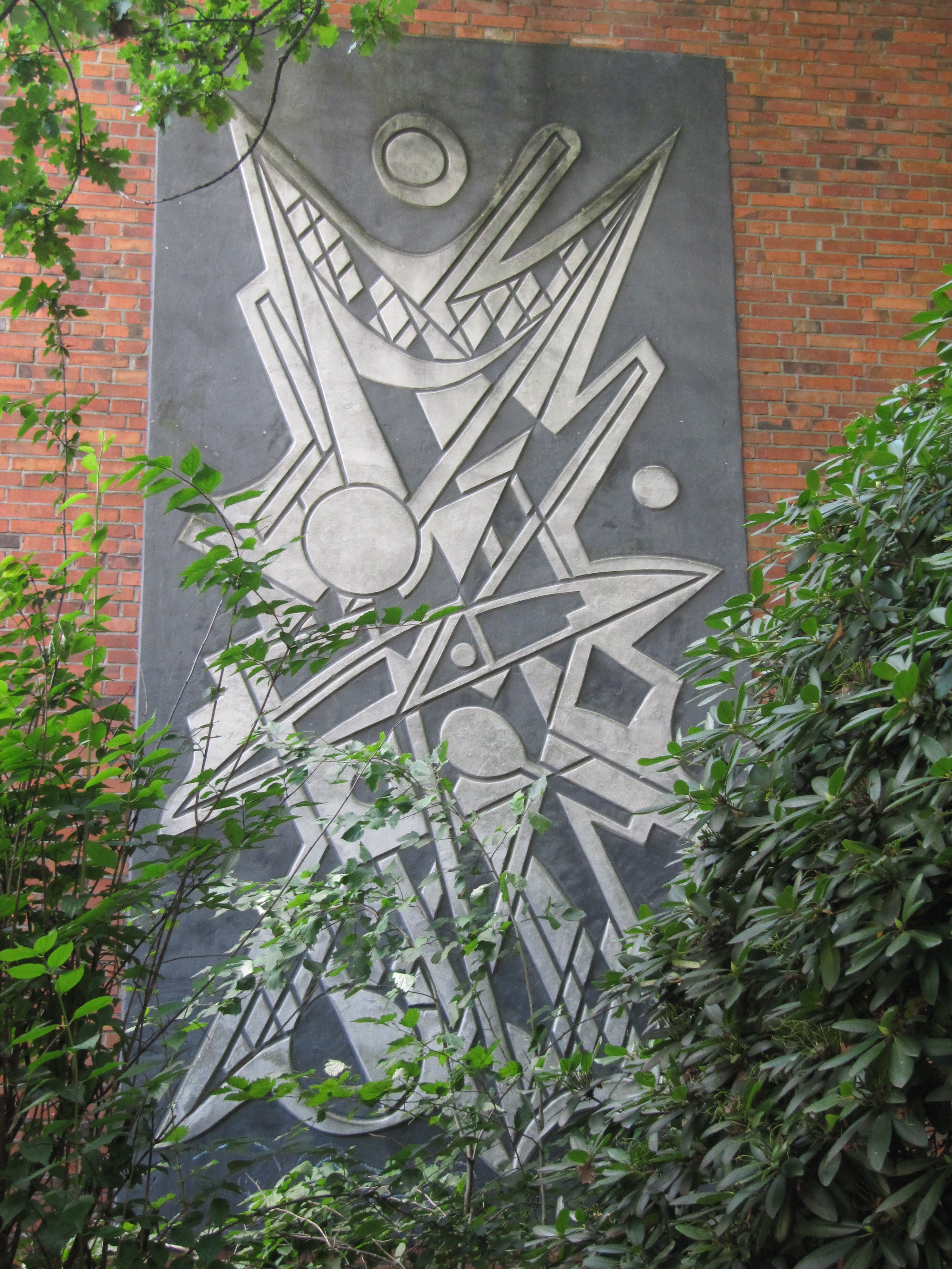 Rhiemsweg 6